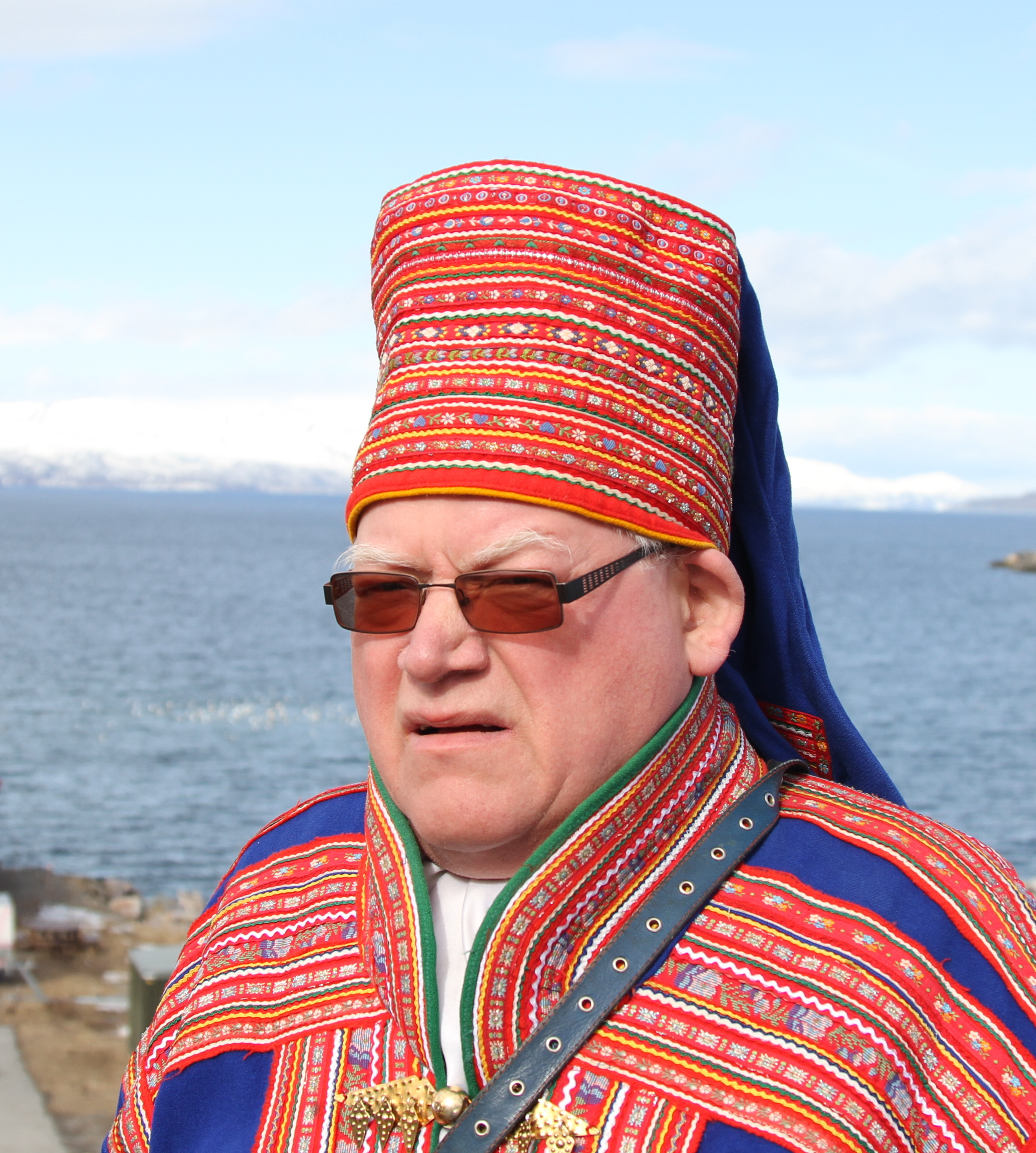 Tore Bongo i Alta, april 2012.